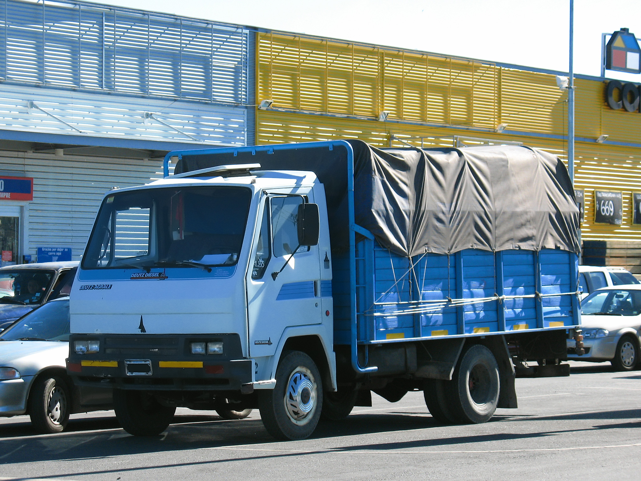 Camion de marca brasileña, con patente Argentina en Chile